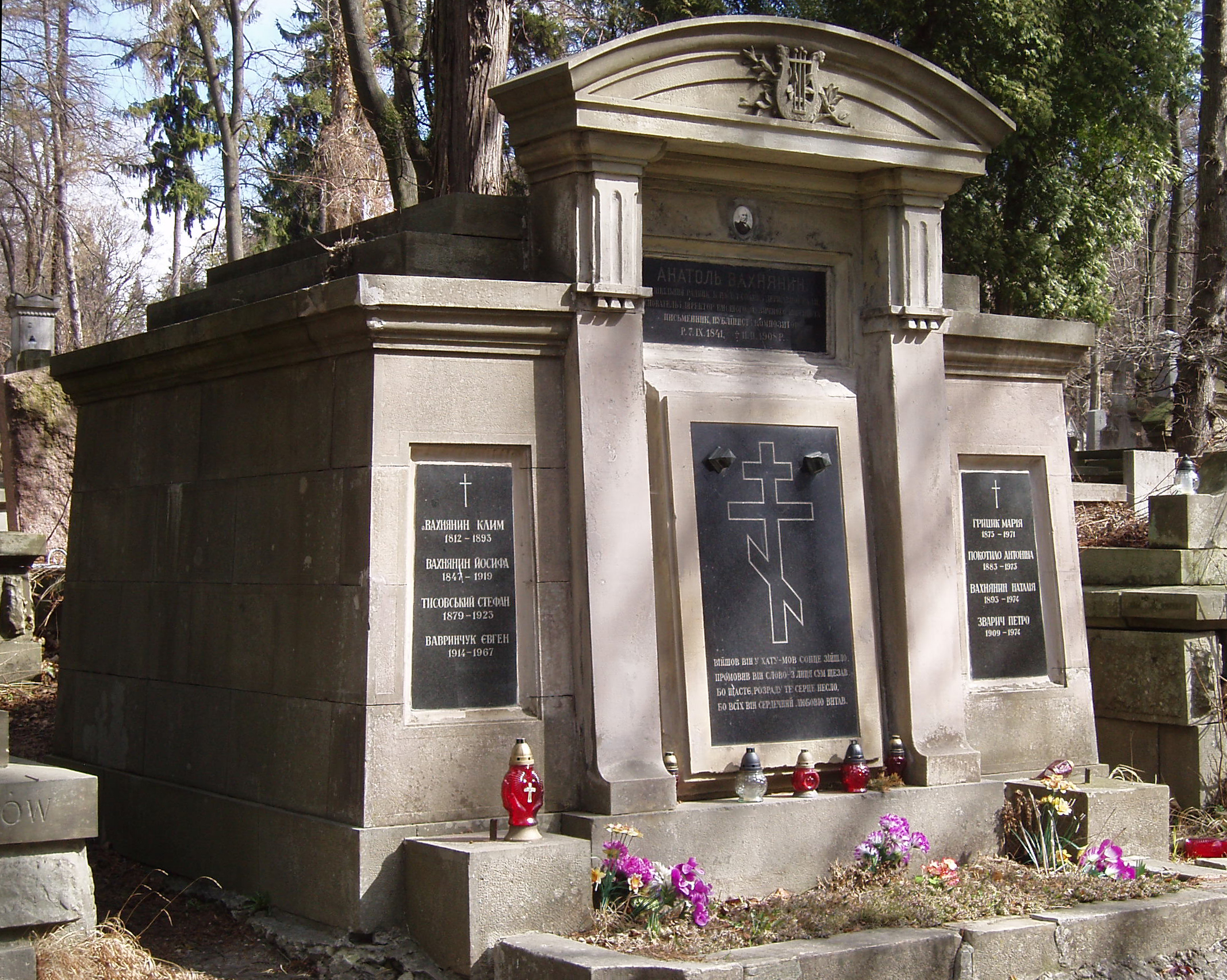 Гробівець родини Вахняниних на Личаківському цвинтарі.